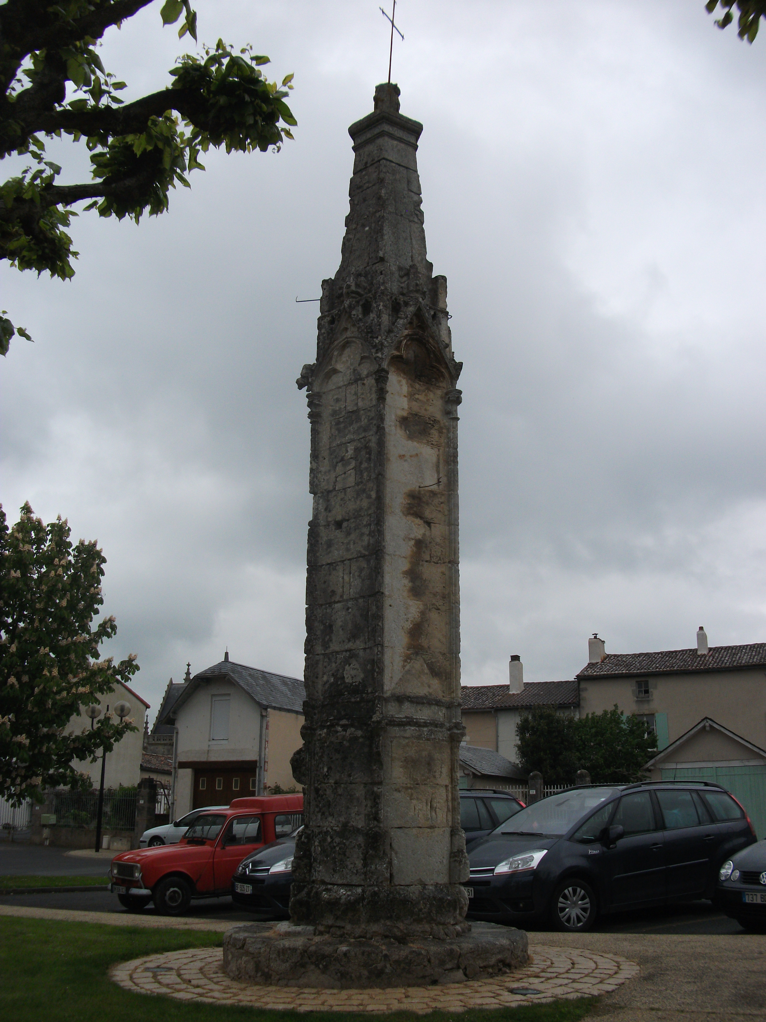 Croix hosannière de Ménigoute .